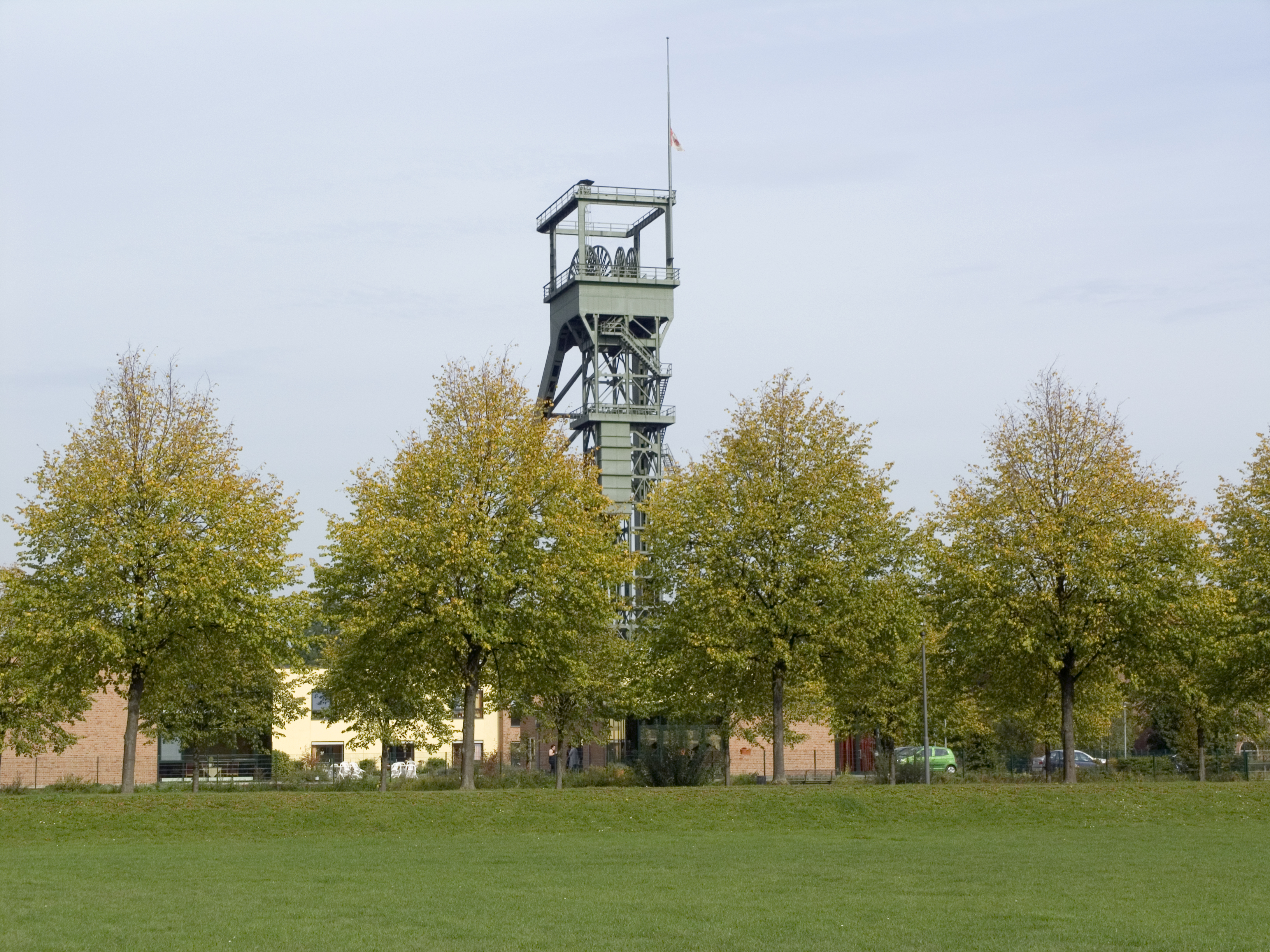 Северный Рейн - Вестфалия, Оберхаузен - шахта Остерфельд